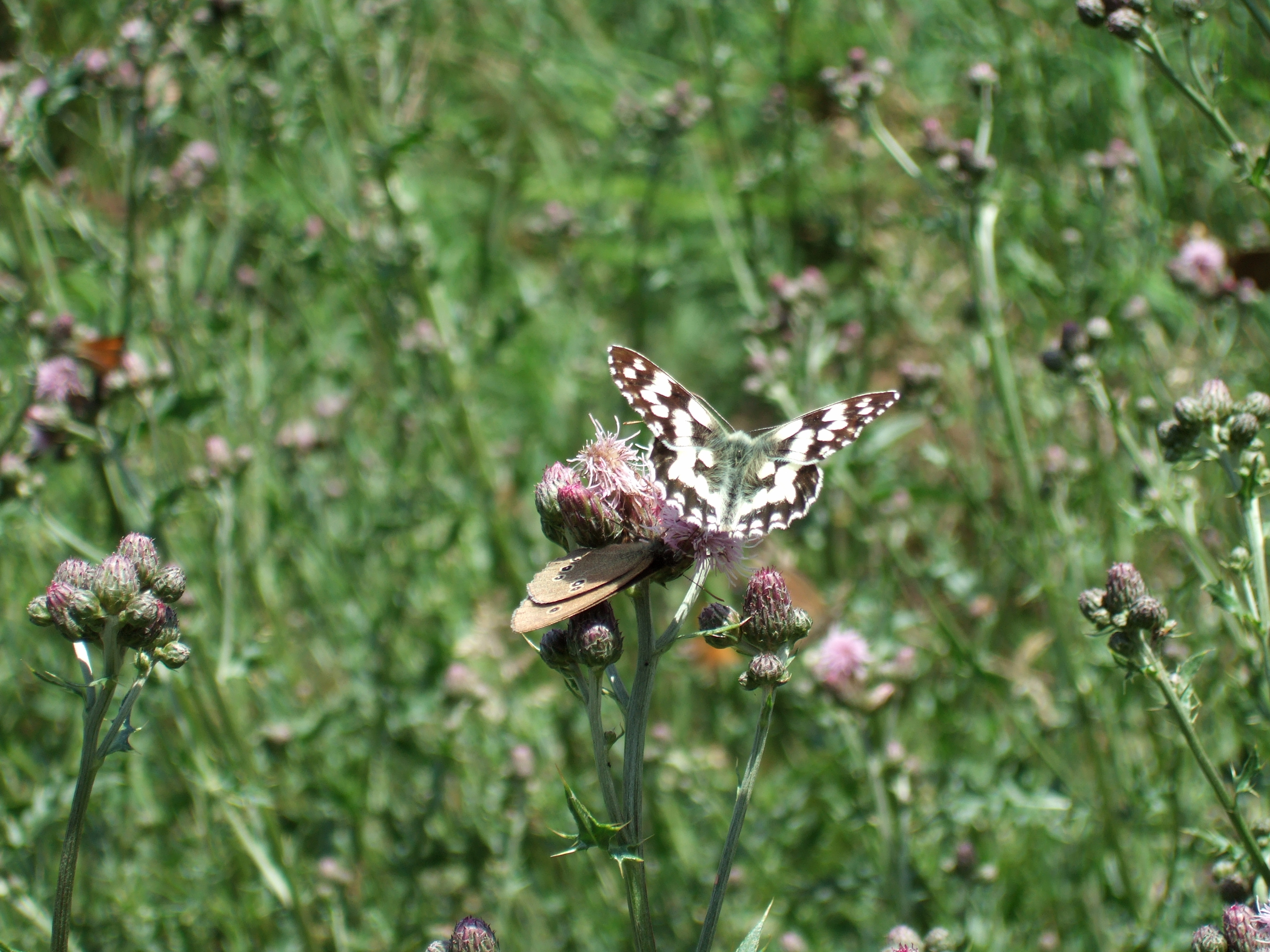 Schachbrettfalter (Melanargia galathea) und Brauner Waldvogel (Aphantopus hyperantus) im Fahrentriesch im Nationalpark Kellerwald-Edersee